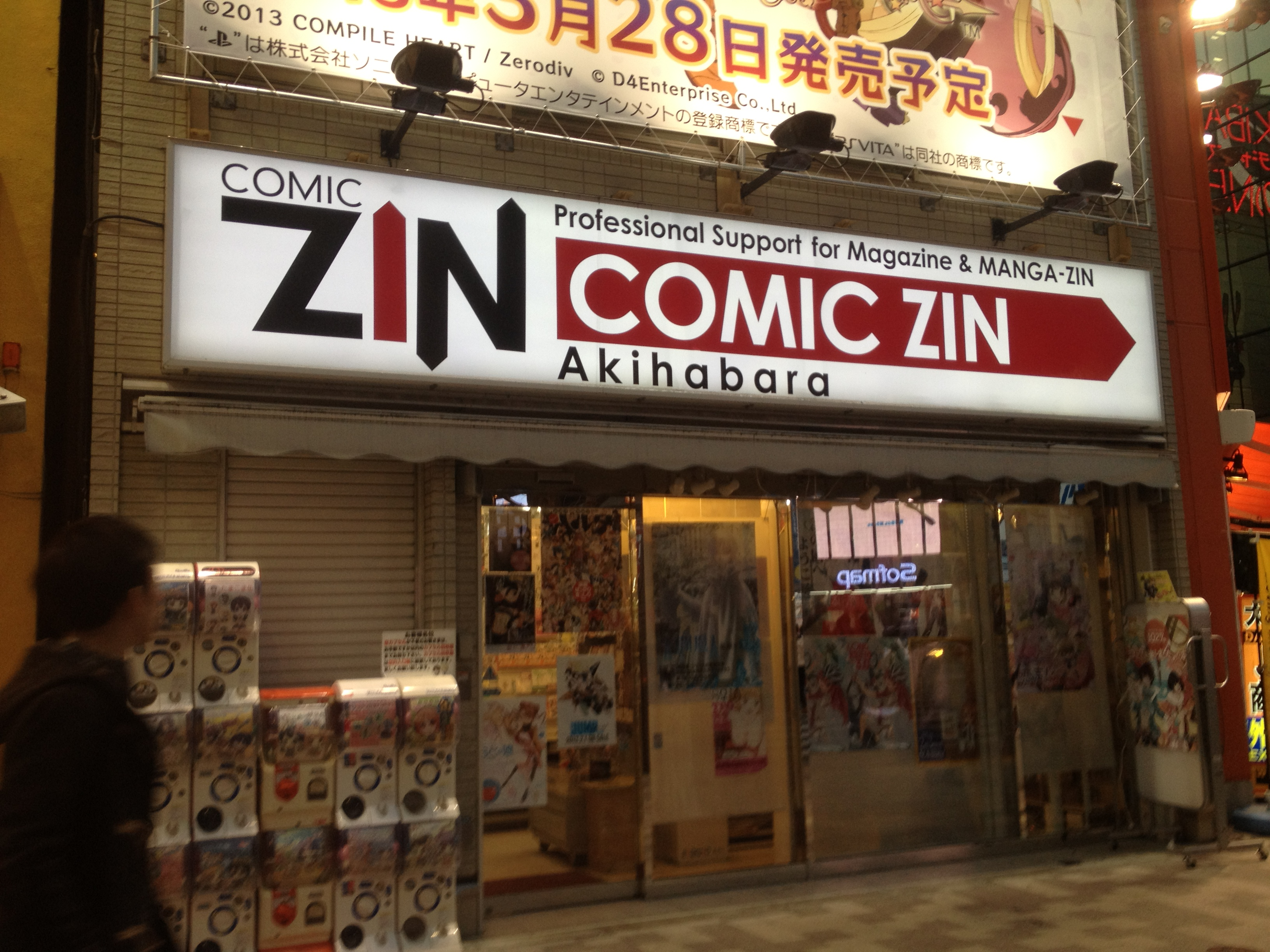 COMIC ZIN 秋葉原店